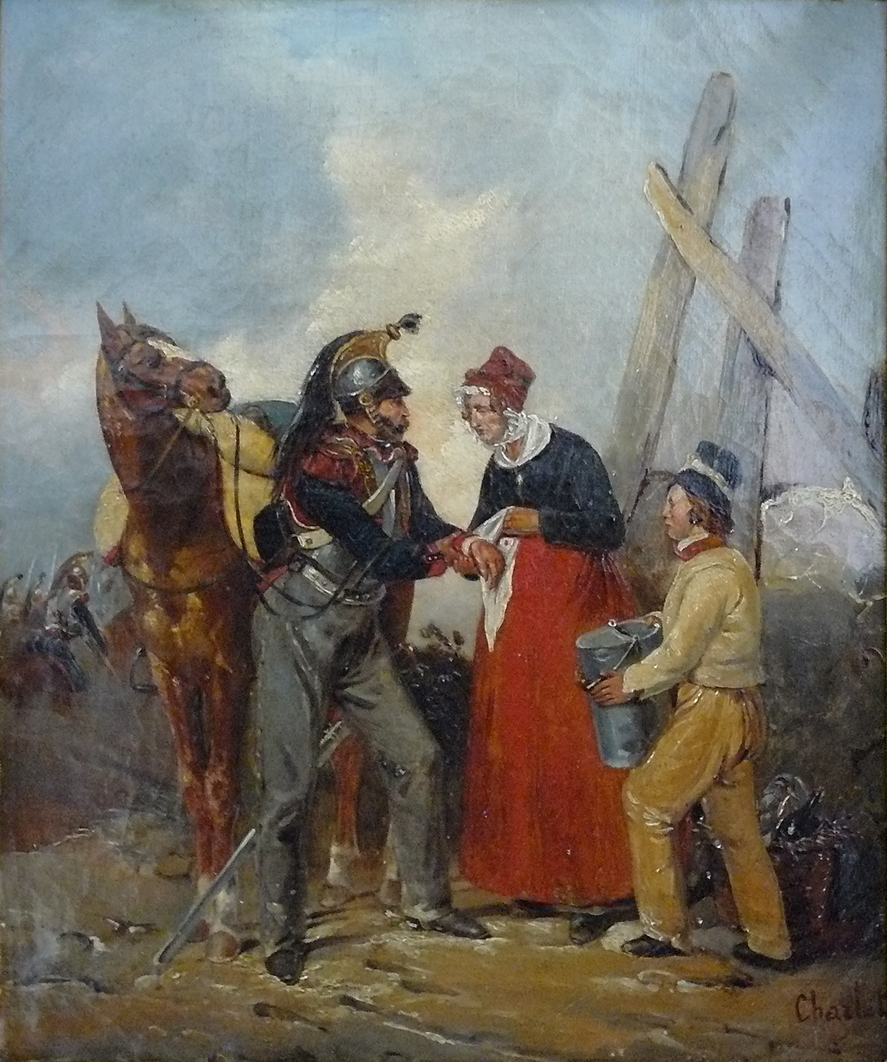 Charlet N.T. - Oil on canvas - Le cuirassier se faisant soigner après la charge - 27.5x35.5.5cm